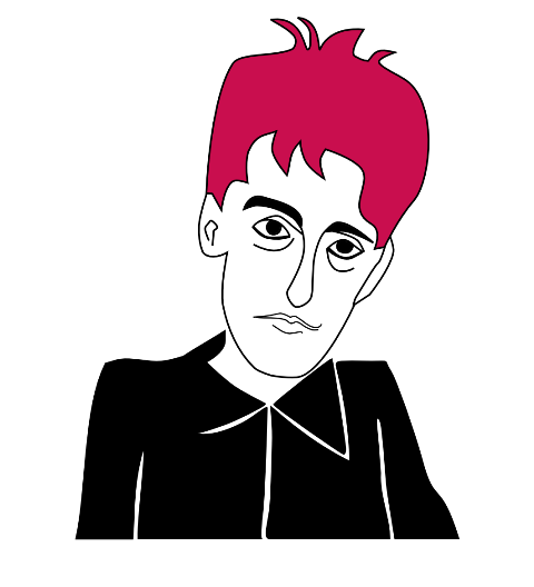 Lois Pereiro, caricatura en Tinta de Lura